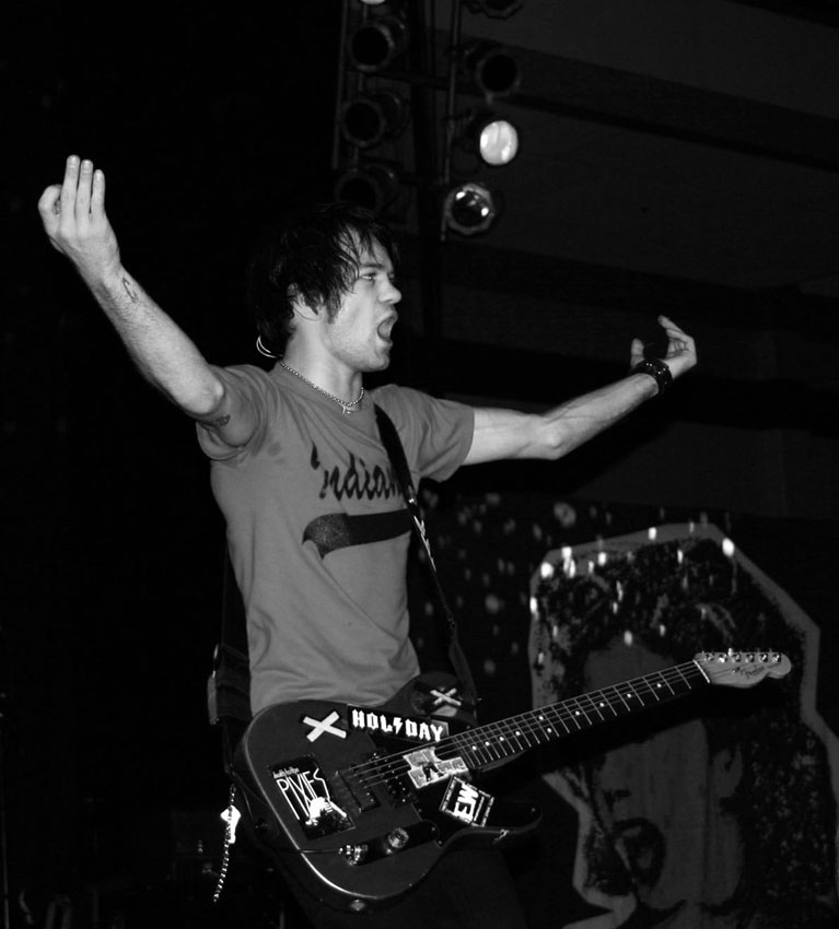 Sum 41 performs